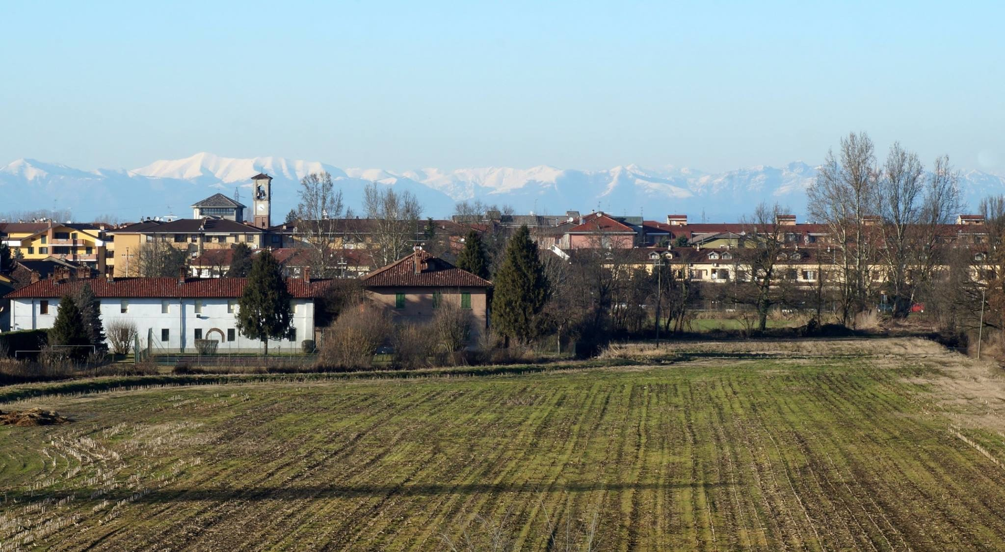 Panorama di Paullo verso nord